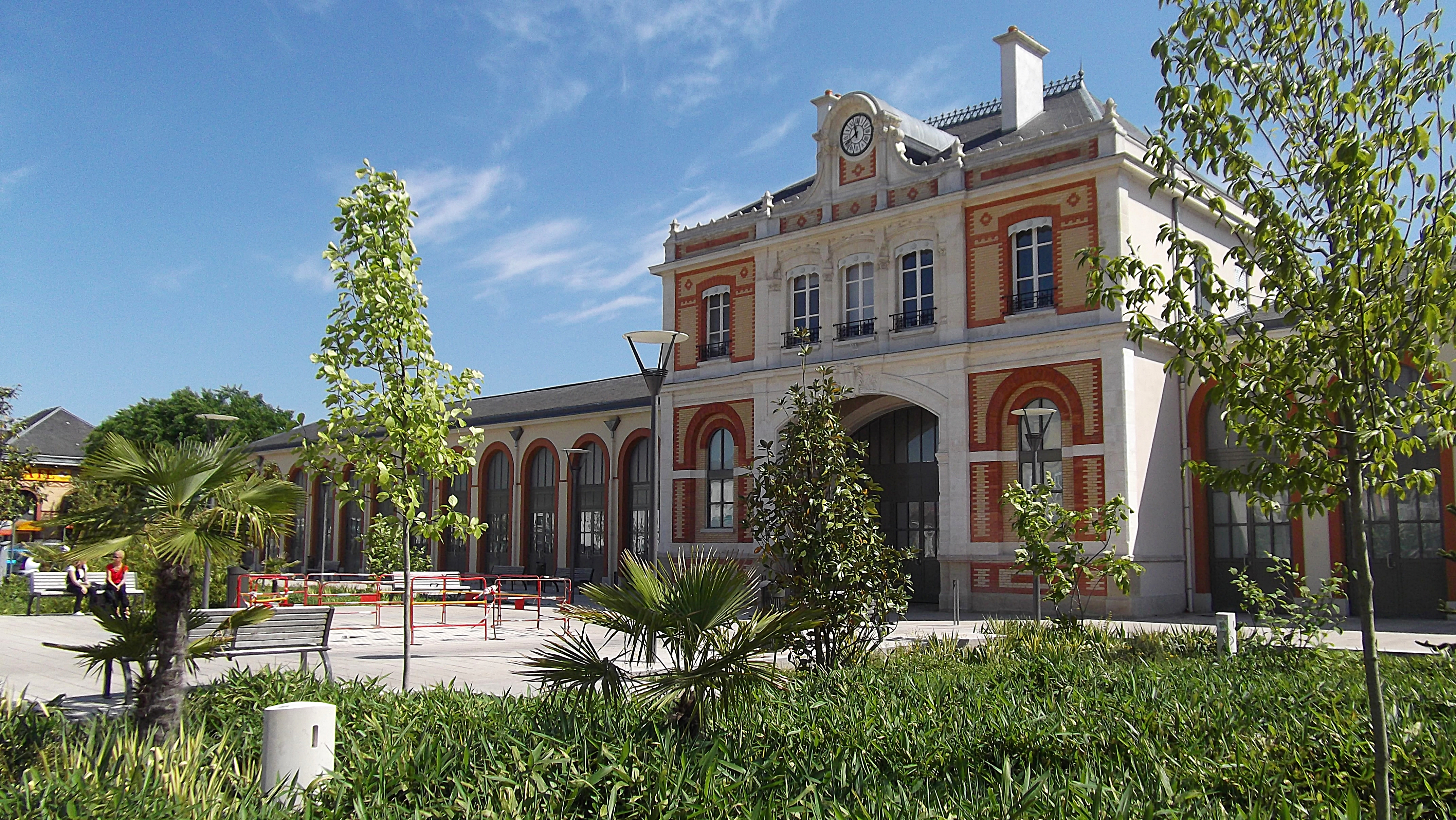 Gare SNCF de Vichy côté porte d'entre PLM.